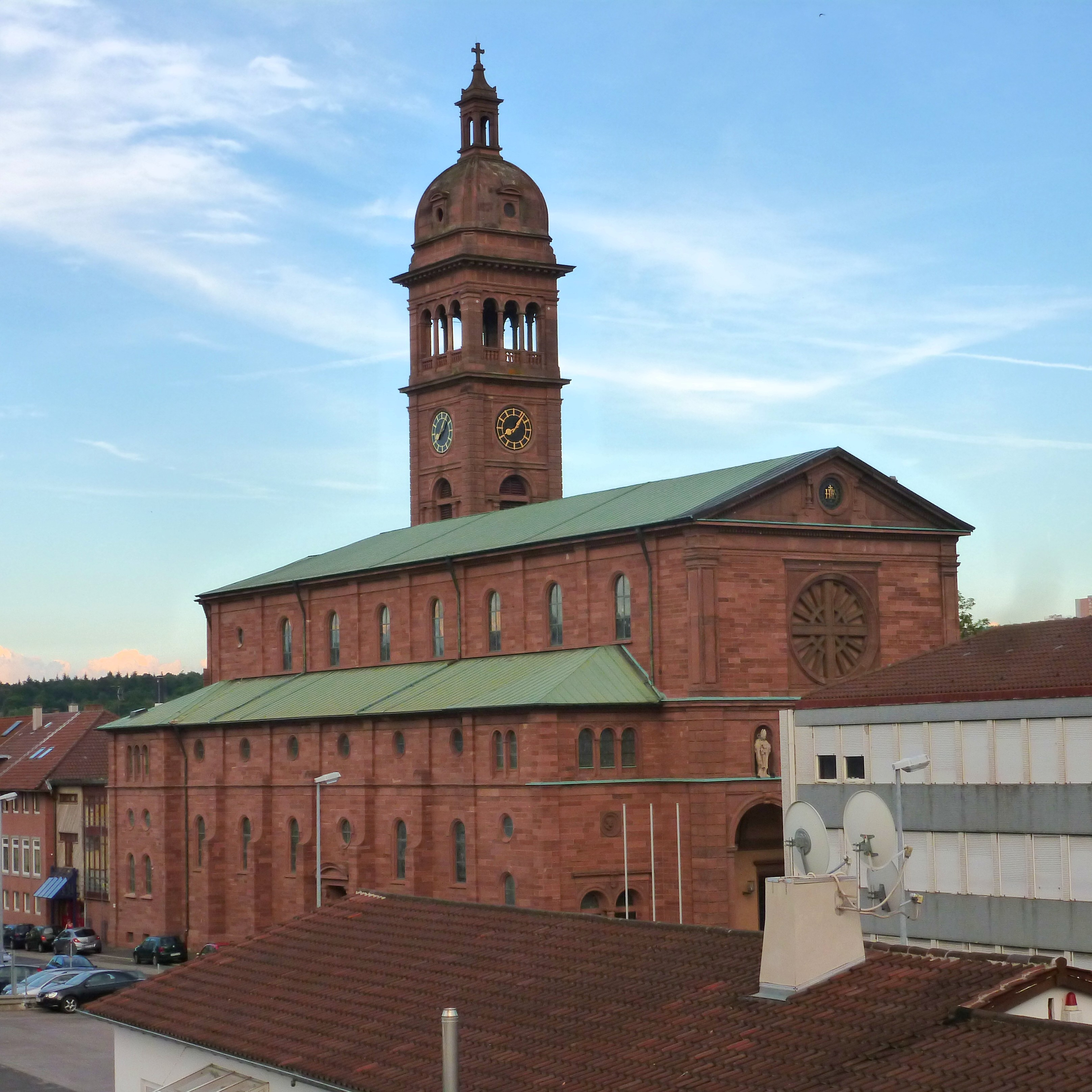 Église St-François à Pforzheim.